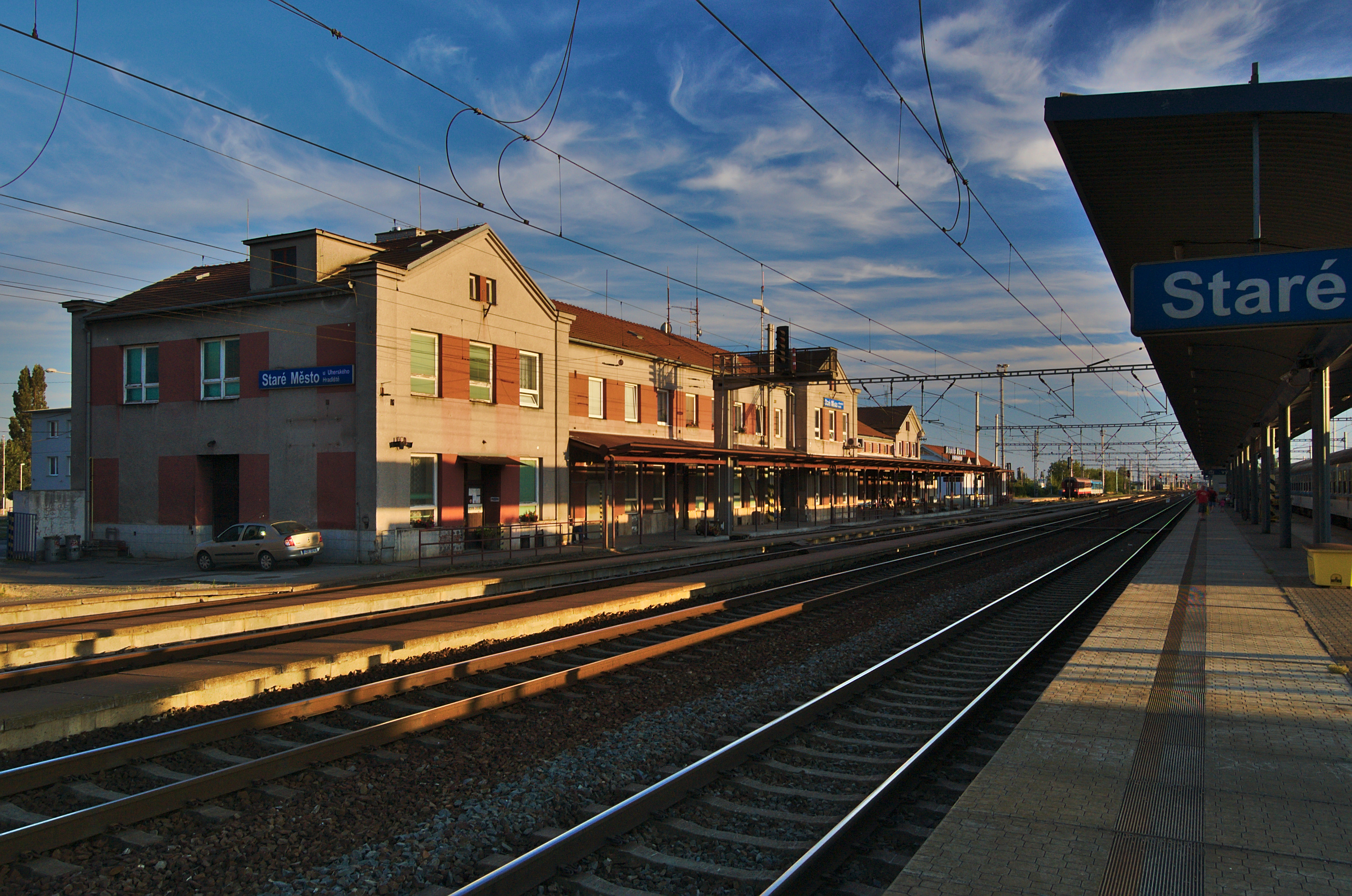 Pohled na nádražní budovu, Staré Město, okres Uherské Hradiště